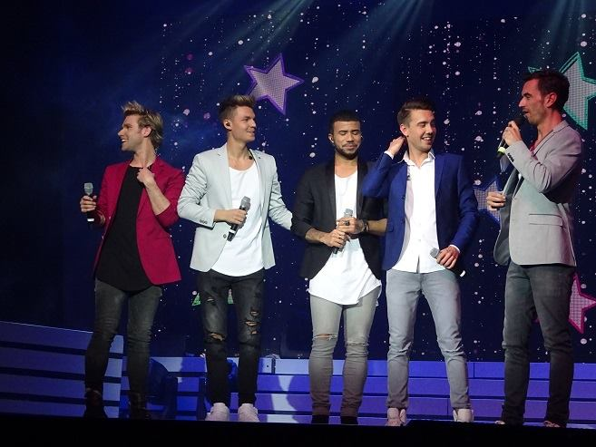 Feuerherz und Florian Silbereisen; 6. Mai 2016 Hannover "Das Beste der Feste"